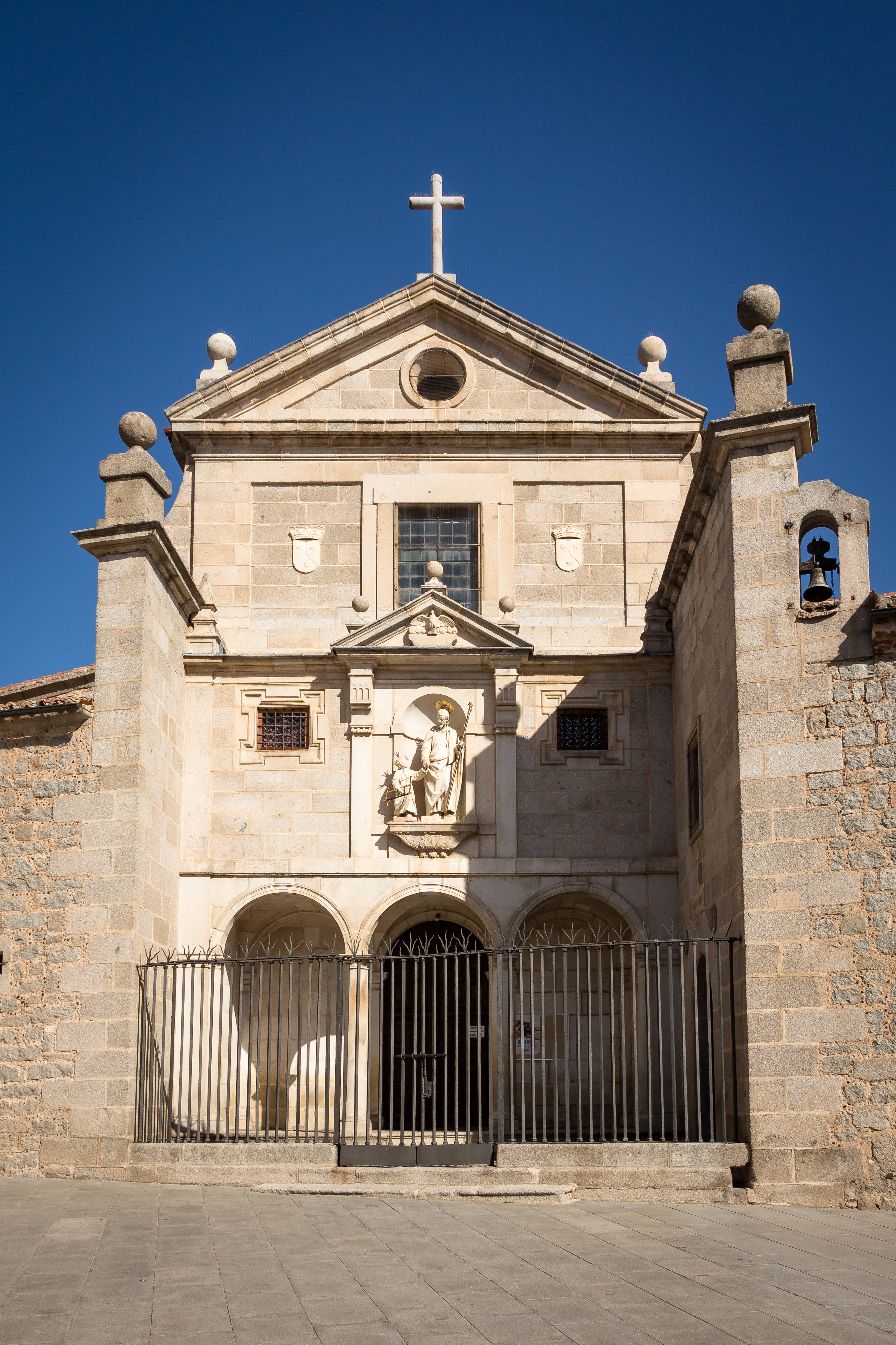 Convento de San José o Convento de las Madres